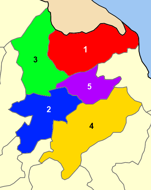 Χάρτης των ενοτήτων (και πρώην δήμων) από τις οποίες αποτελείται ο Δήμος Τεμπών